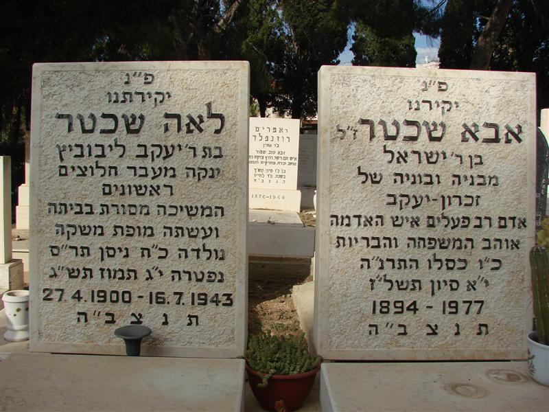 לאה ואבא שכטר - בית הקברות בזכרון יעקב